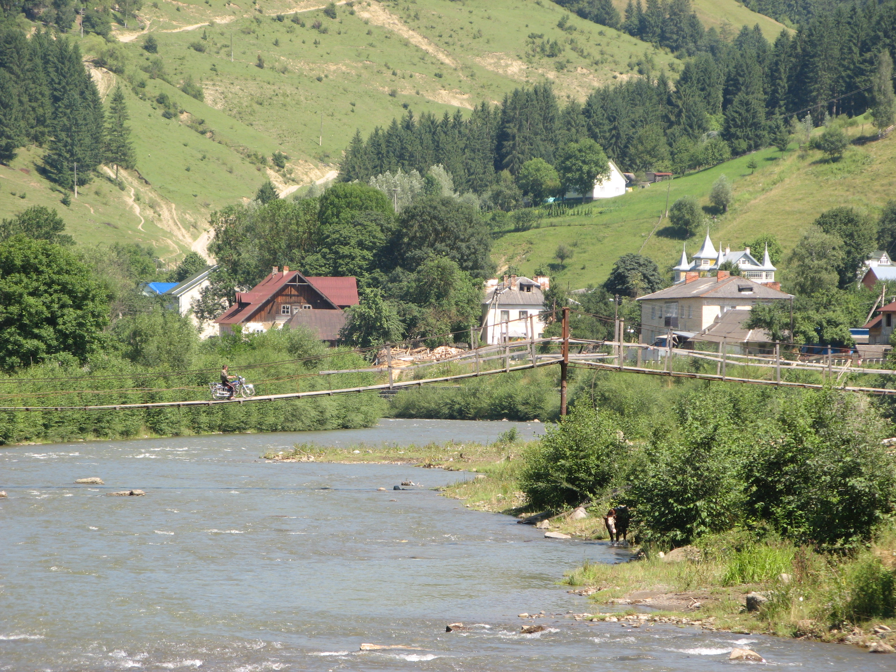 р. Білий Черемош біля села Довгопілля